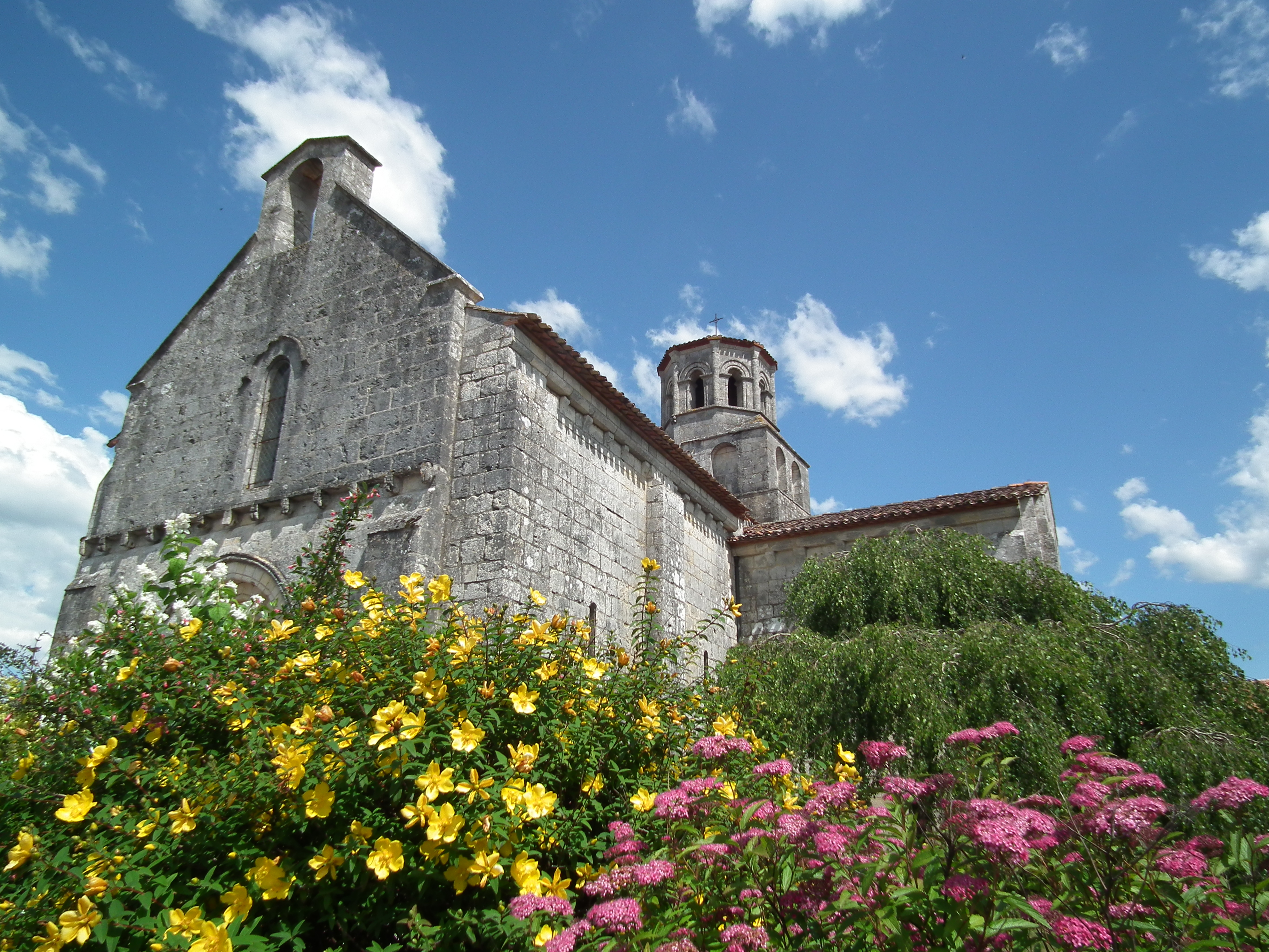 L'église de Thaims